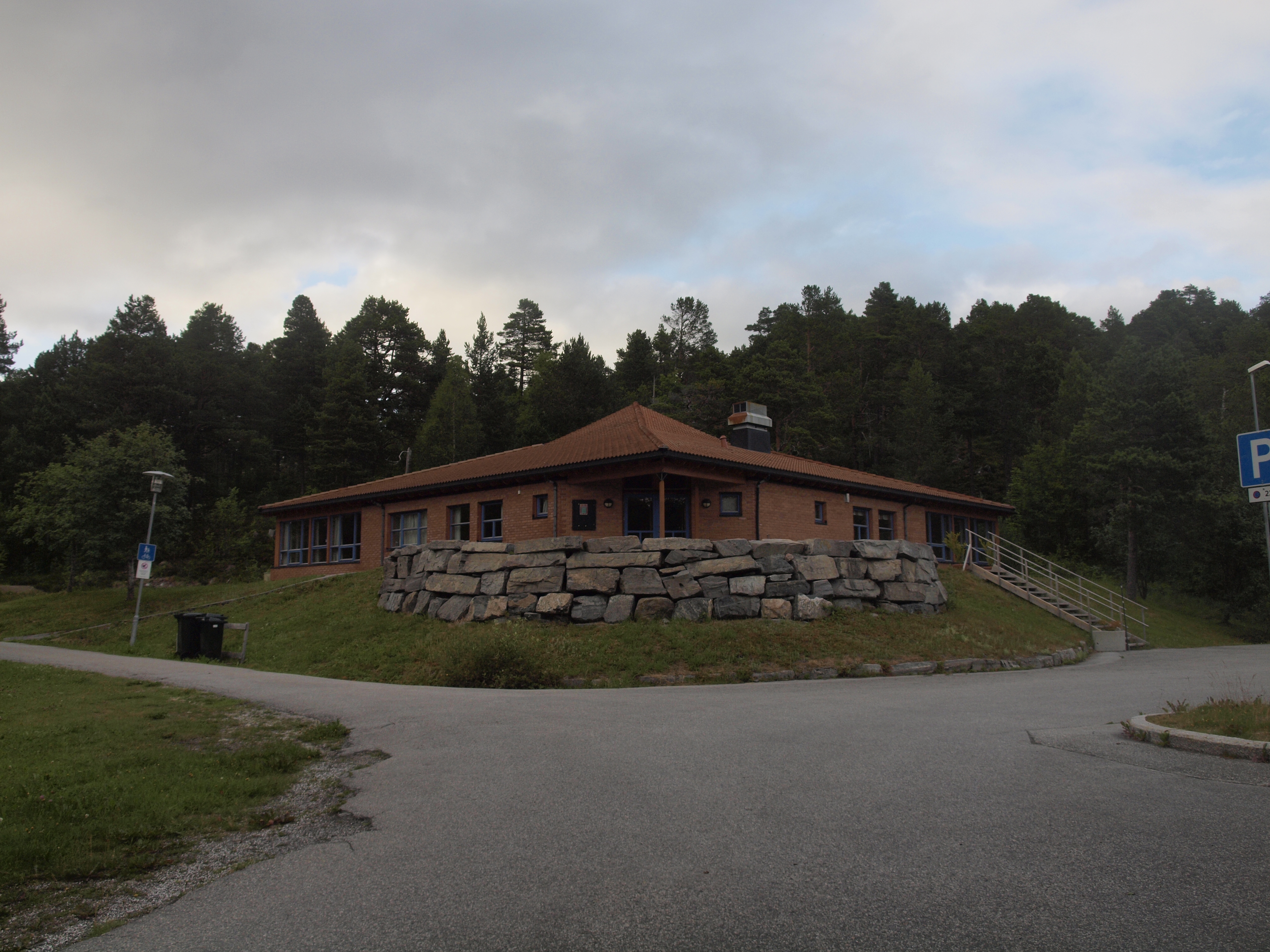 Nordbyen kirke, Norway